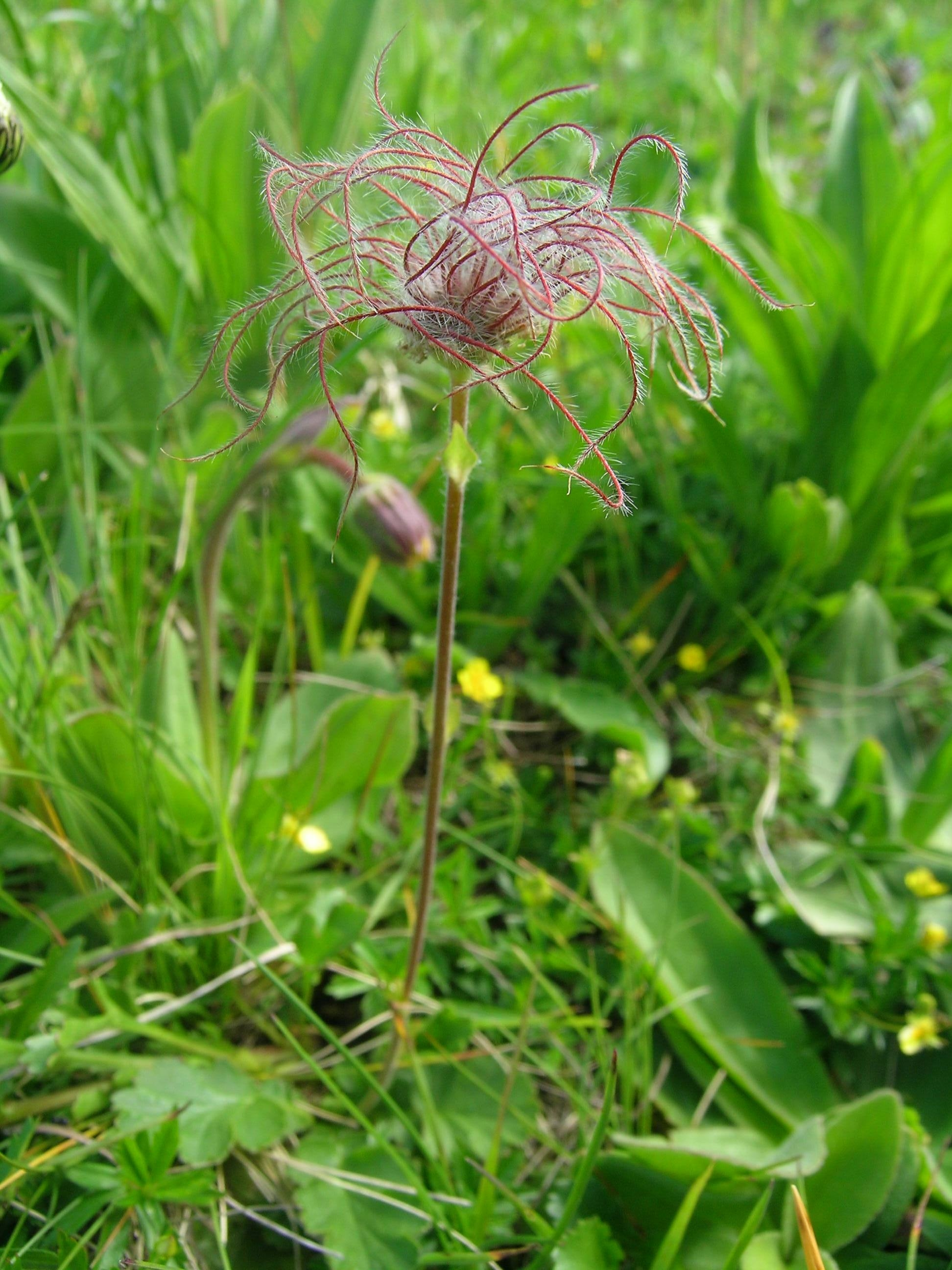 Geum montanum, Schynige Platte, Kanton Bern, Schweiz